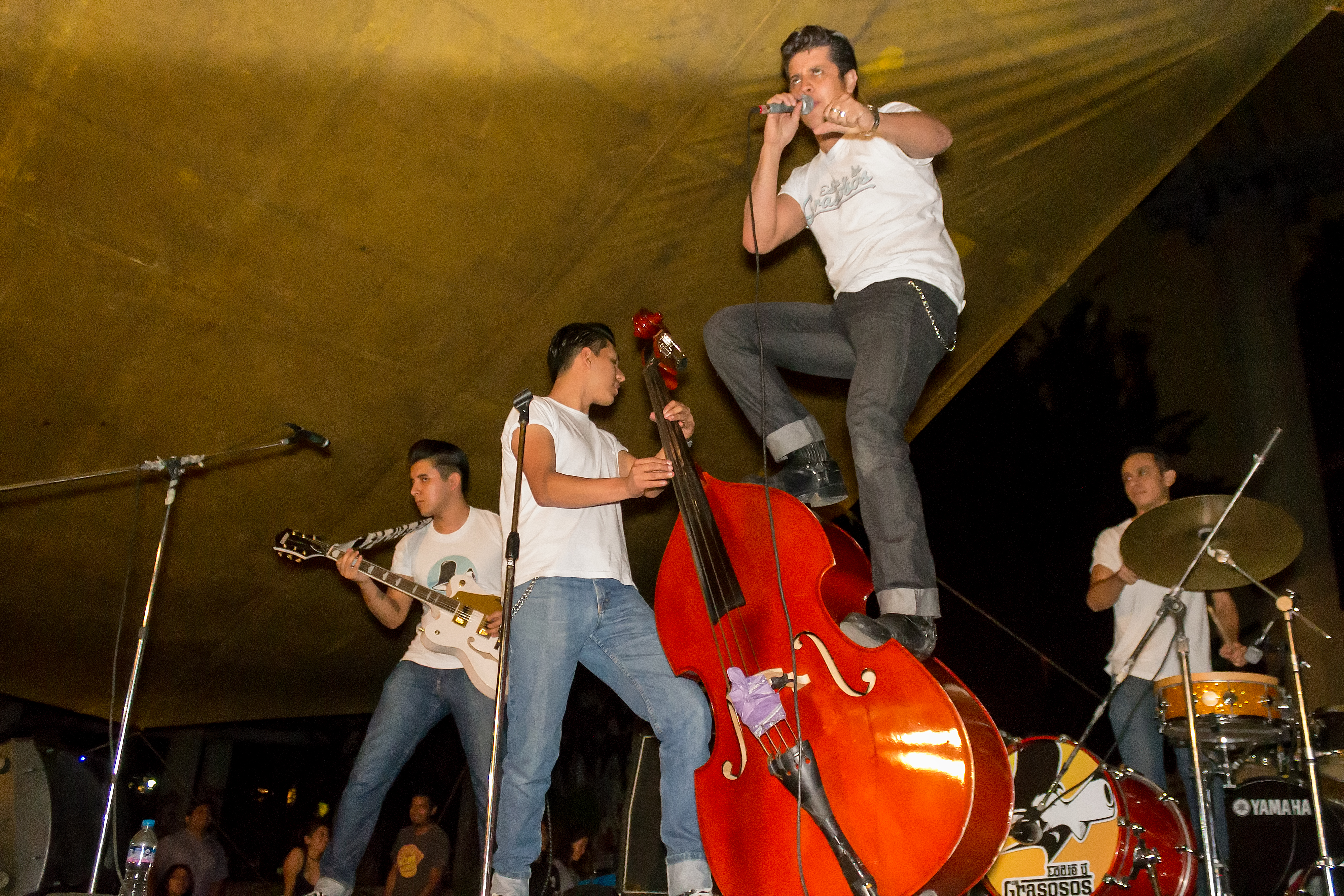 Eddie y los Grasosos en una de sus presentaciones